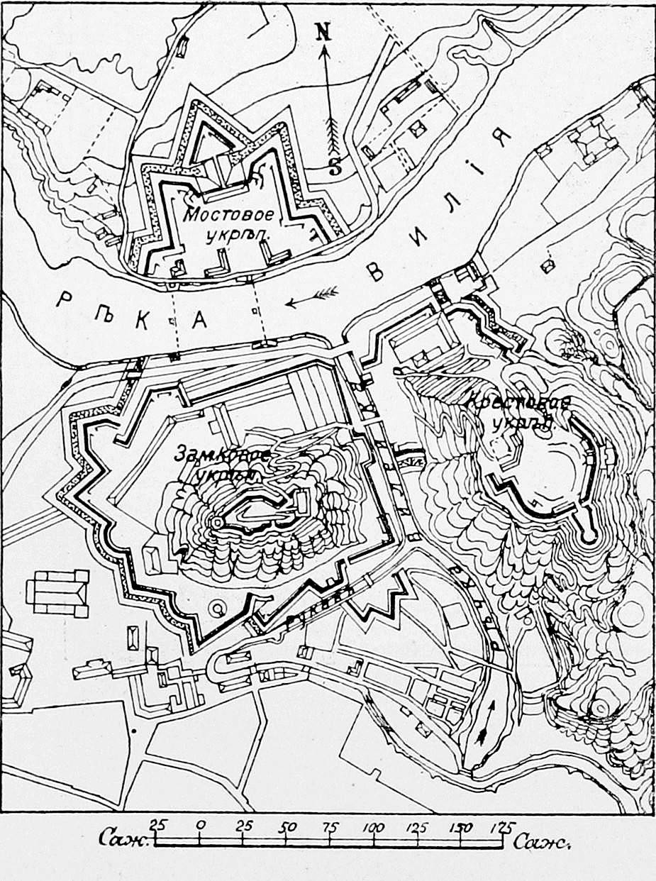 Данное изображение было использовано в статье «Виленские укрепления» опубликованной в шестом томе «Военной энциклопедии», который был издан книгоиздательским товариществом Ивана Дмитриевича Сытина в 1912 году в столице Российской империи городе Санкт-Петербурге.